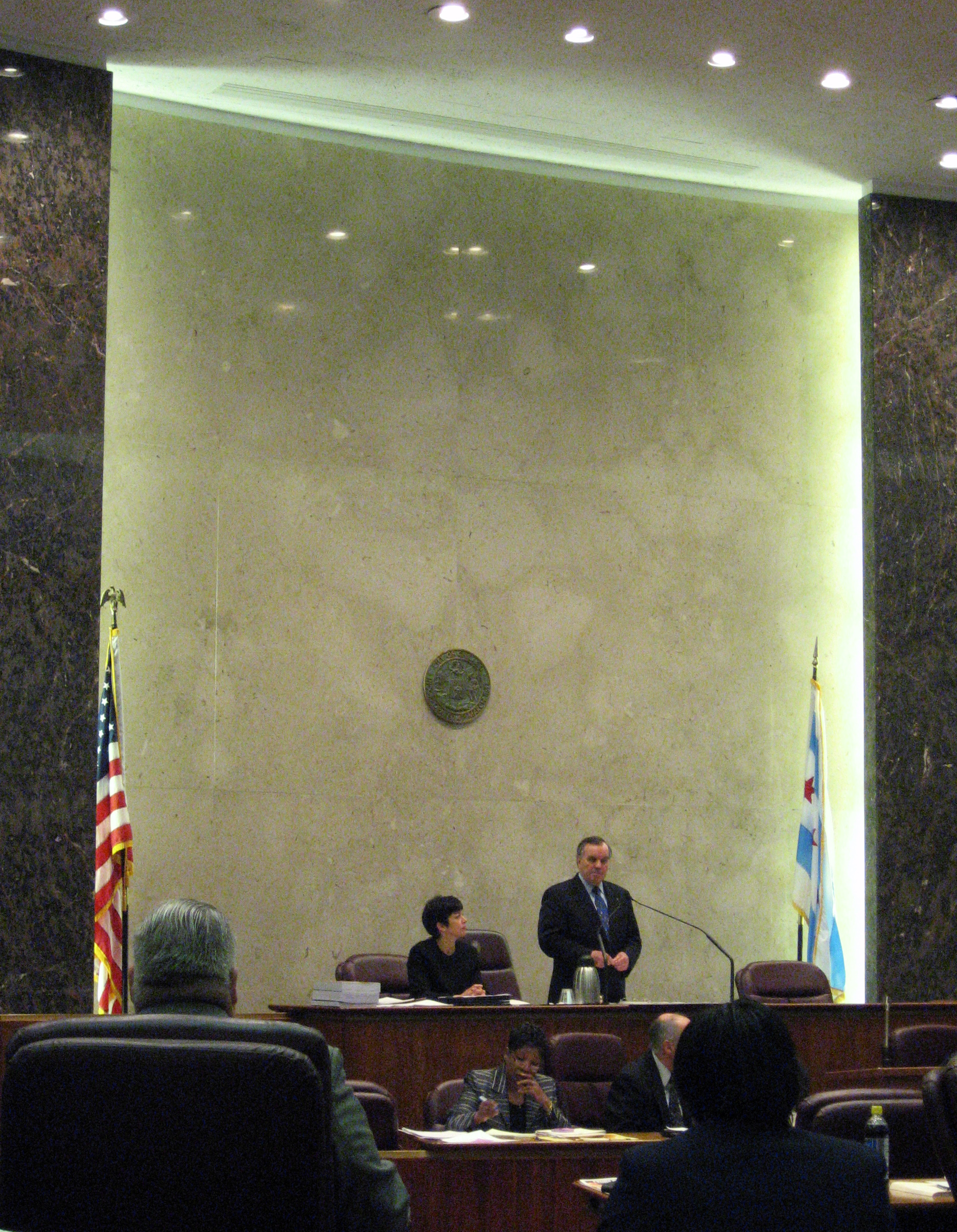 Address